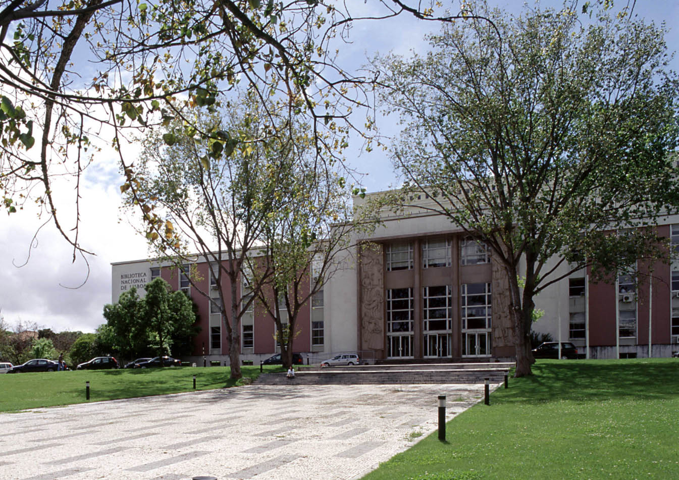 Arquitecto responsável: António Barreto Viana. Fotógrafo: Manuel Silveira Ramos. Data de produção da fotografia original: 2002-2003. CFT169.586.ic